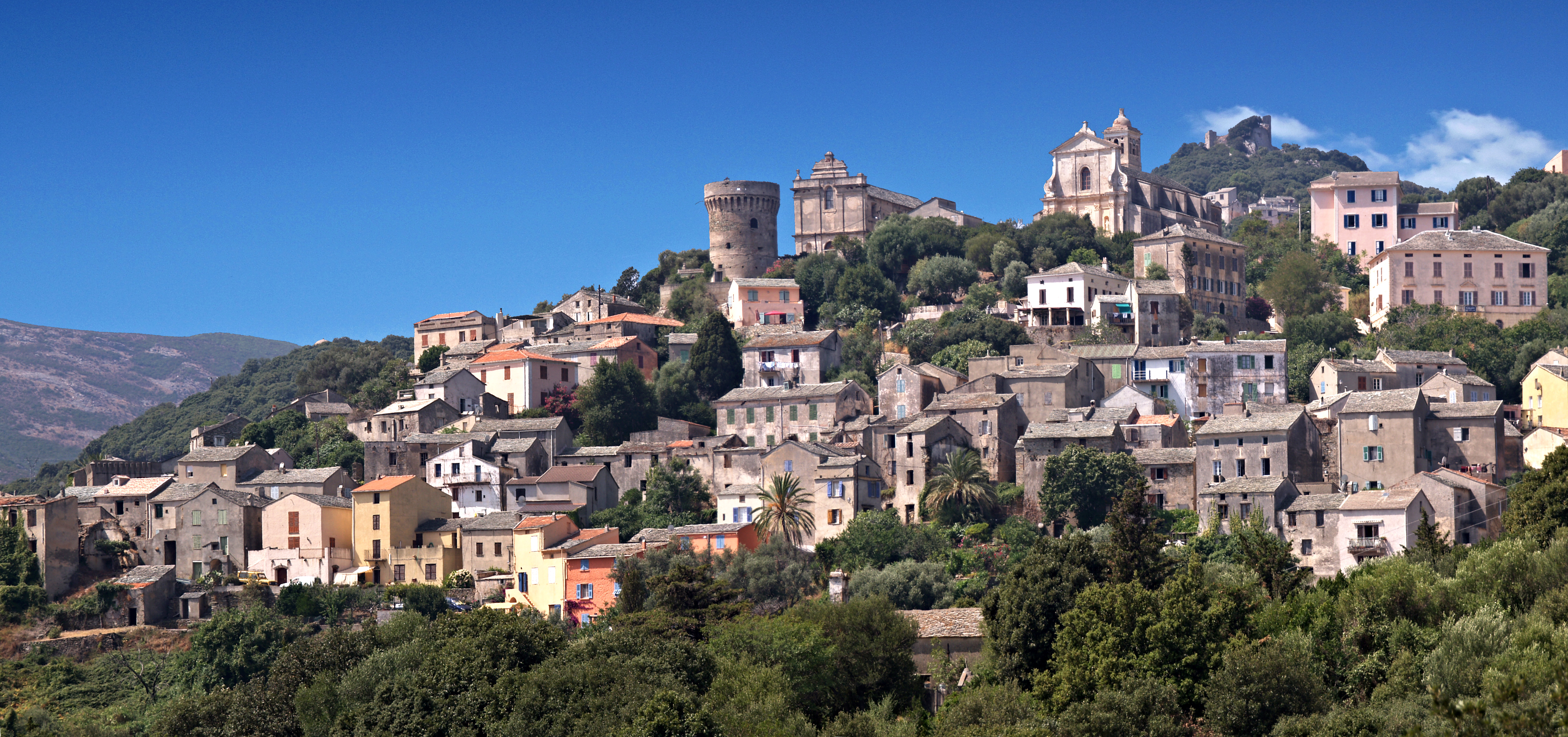 Rogliano (Corse) - Bettolacce